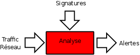 Schema simplifié d'un NIDS